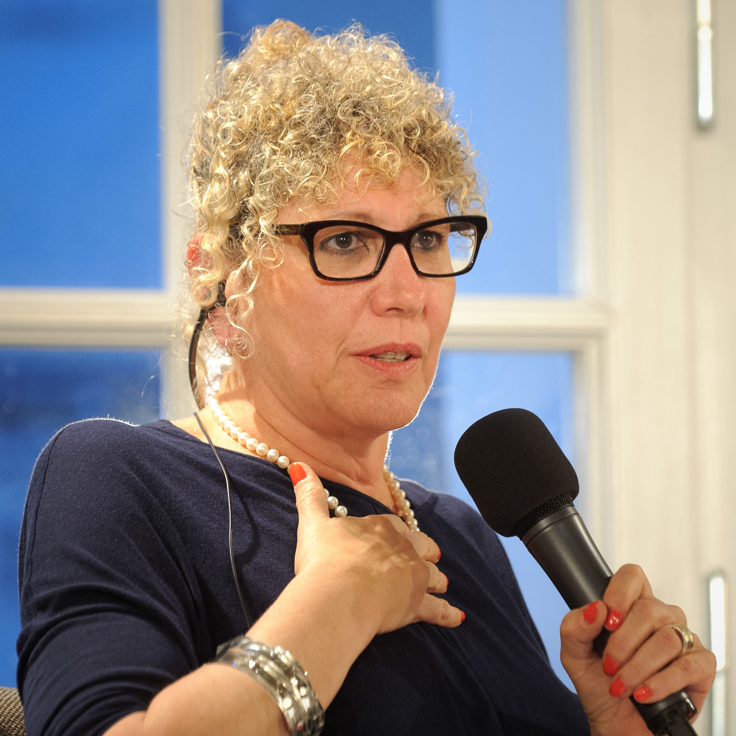 Lizzie Doron (Schriftstellerin) Deutsch-Israelische Literaturtage 2012 Die deutsch-israelischen Literaturtage - organisiert vom Goethe-Institut und der Heinrich-Böll-Stiftung - finden seit sechs Jahren abwechselnd in Berlin und in Tel Aviv statt. Neben Lesungen und Diskussionen gibt es im April auch Filme zu sehen. Abgeschlossen wird *beziehungsweise(n)* durch eine Diskussionsrunde, in der Aktivist/innen, Journalist/innen und Autor/innen über den Begriff der Solidarität, über gesellschaftliche Vorstellungen des Zusammenhalts und der sozialen Gerechtigkeit debattieren. Foto: Stephan Röhl